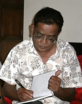 হুমায়ূন আহমেদ Humayun Ahmed signing